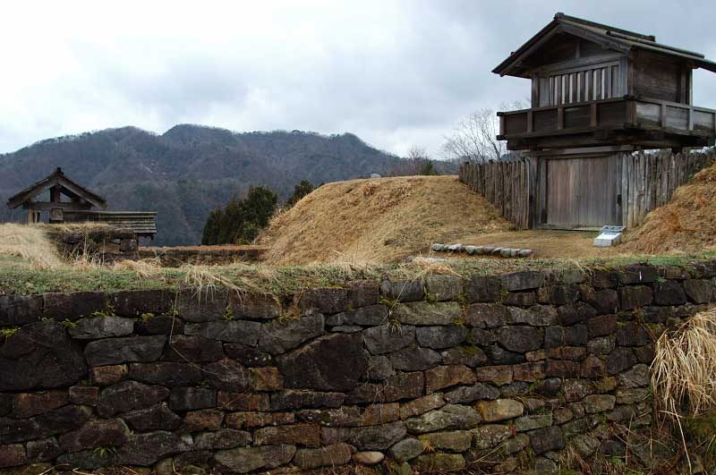 鳥越城本丸の石垣と門(復元) Torigoe Castle, Hakusan, Ishikawa, Japan 2006年4月9日、投稿者本人の撮影。